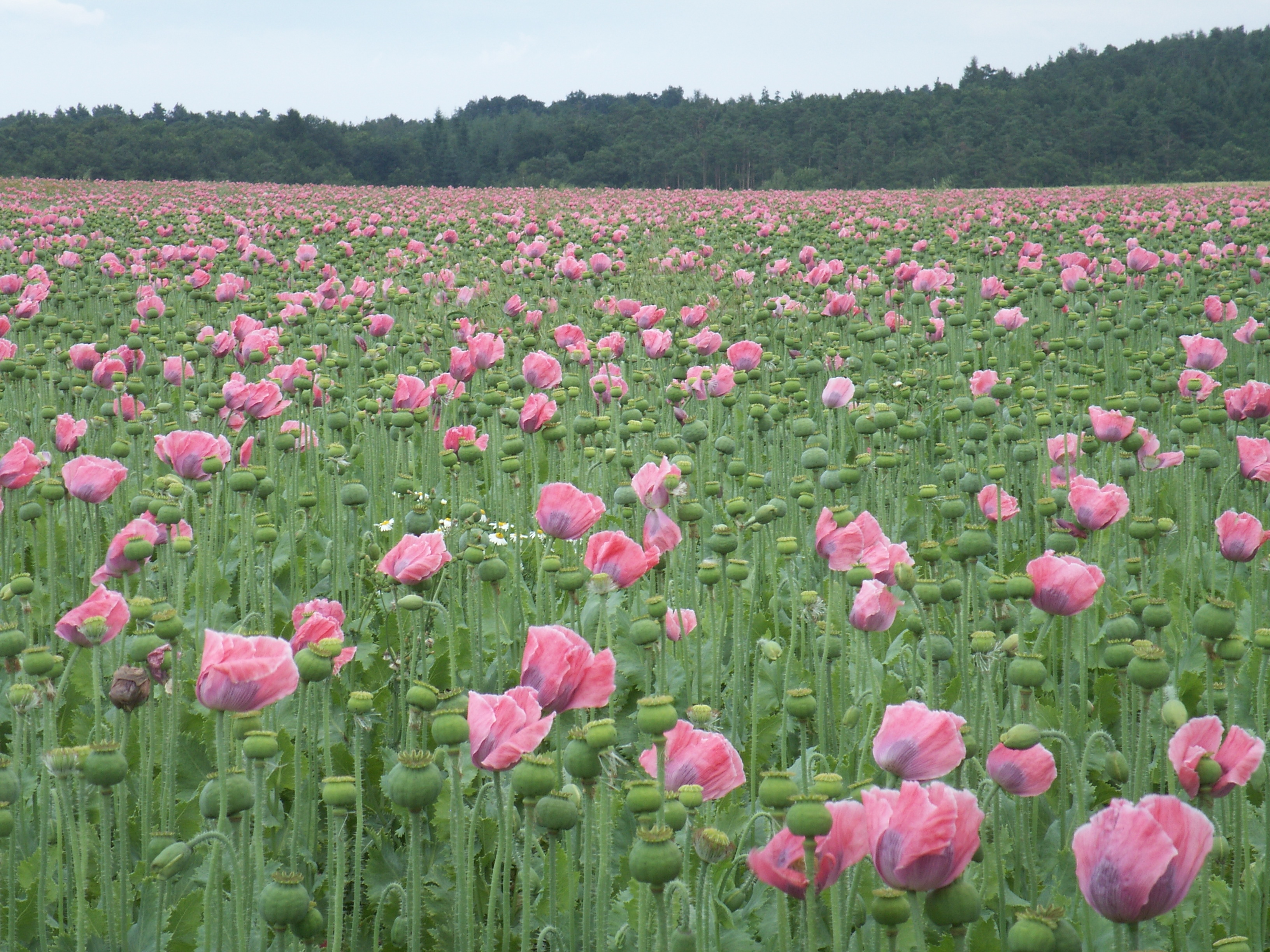 Papaver somniferum, Mohnfeld (Waldviertel, Niederösterreich)